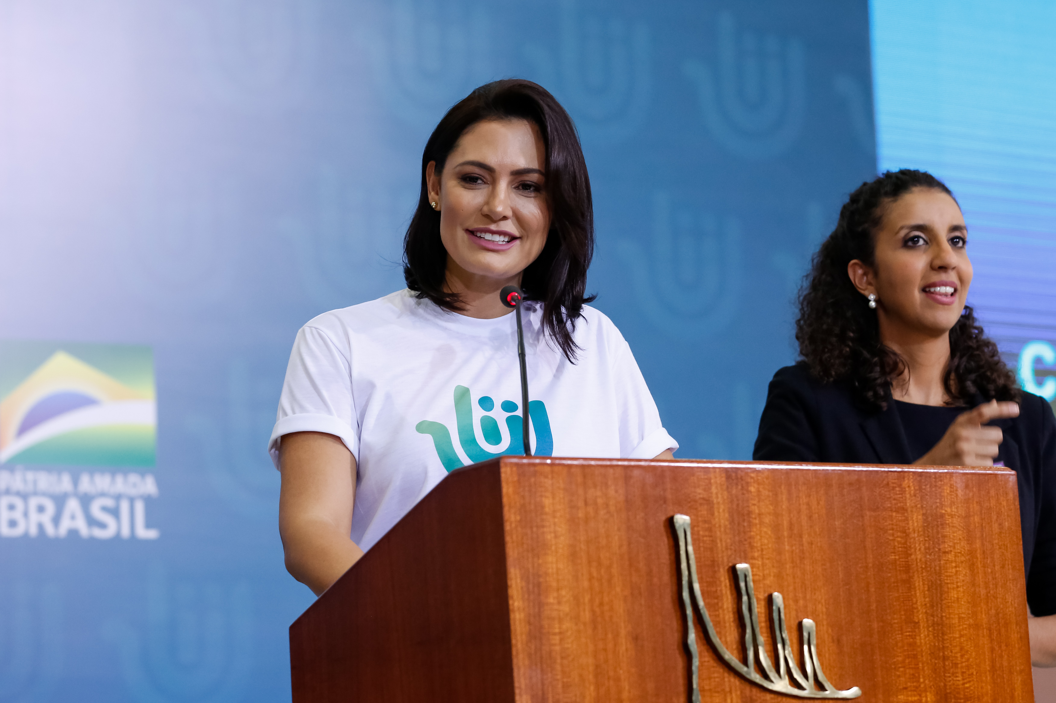 (Brasília - DF, 02/12/2019) Palavras da senhora Michelle Bolsonaro.